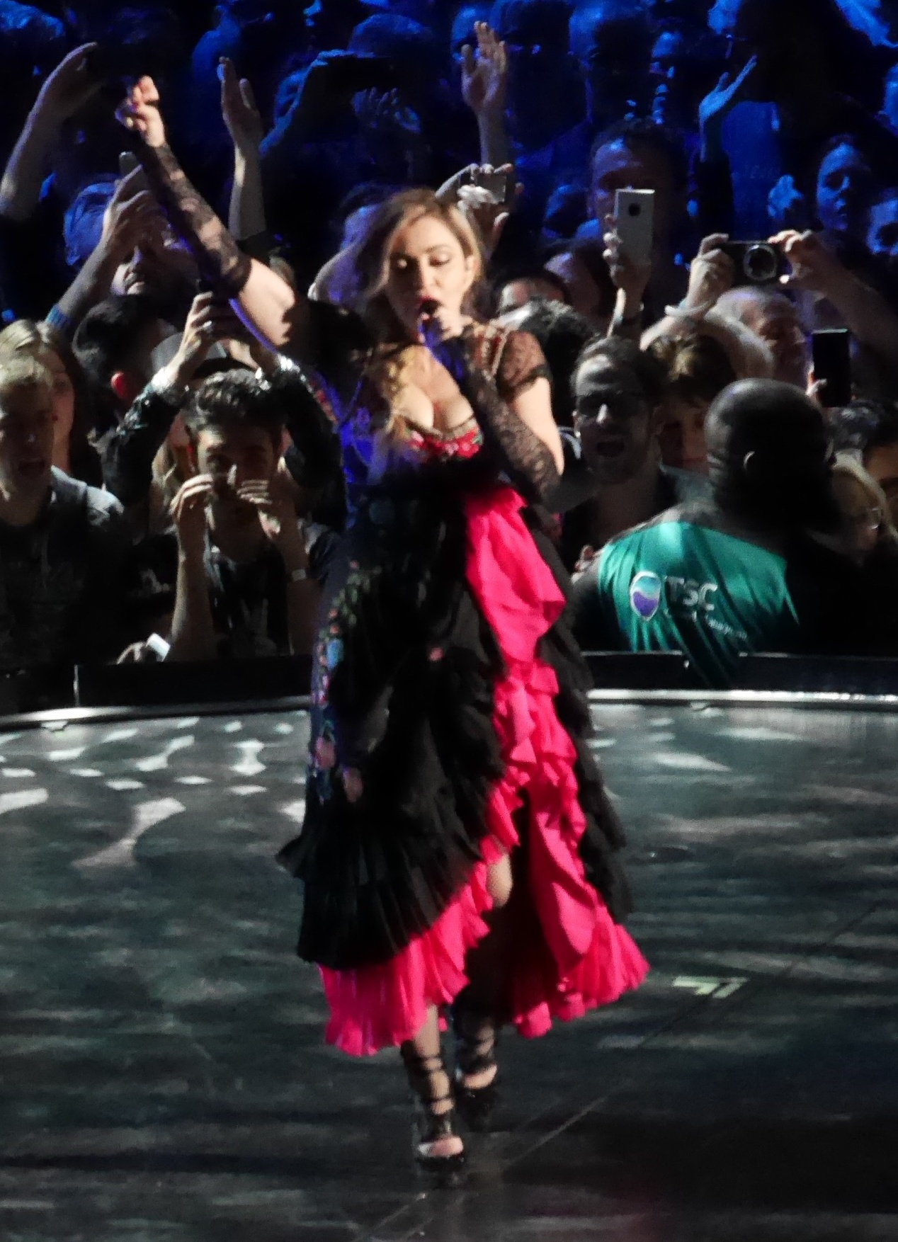 Rebel Heart Tour @ Amsterdam